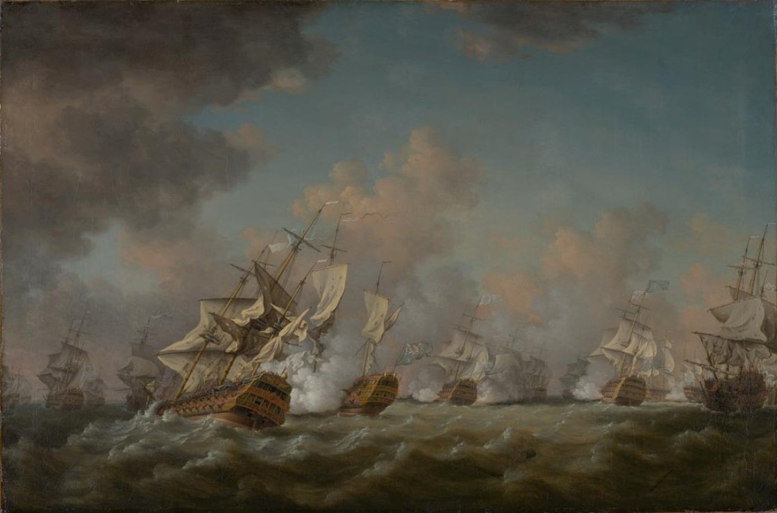 Vue générale de la bataille des Cardinaux le 20 novembre 1759. Guerre de Sept Ans. A gauche au premier plan : représentation possible du Thésée sur le point de chavirer dans un coup de vent en combattant le HMS Torbay.